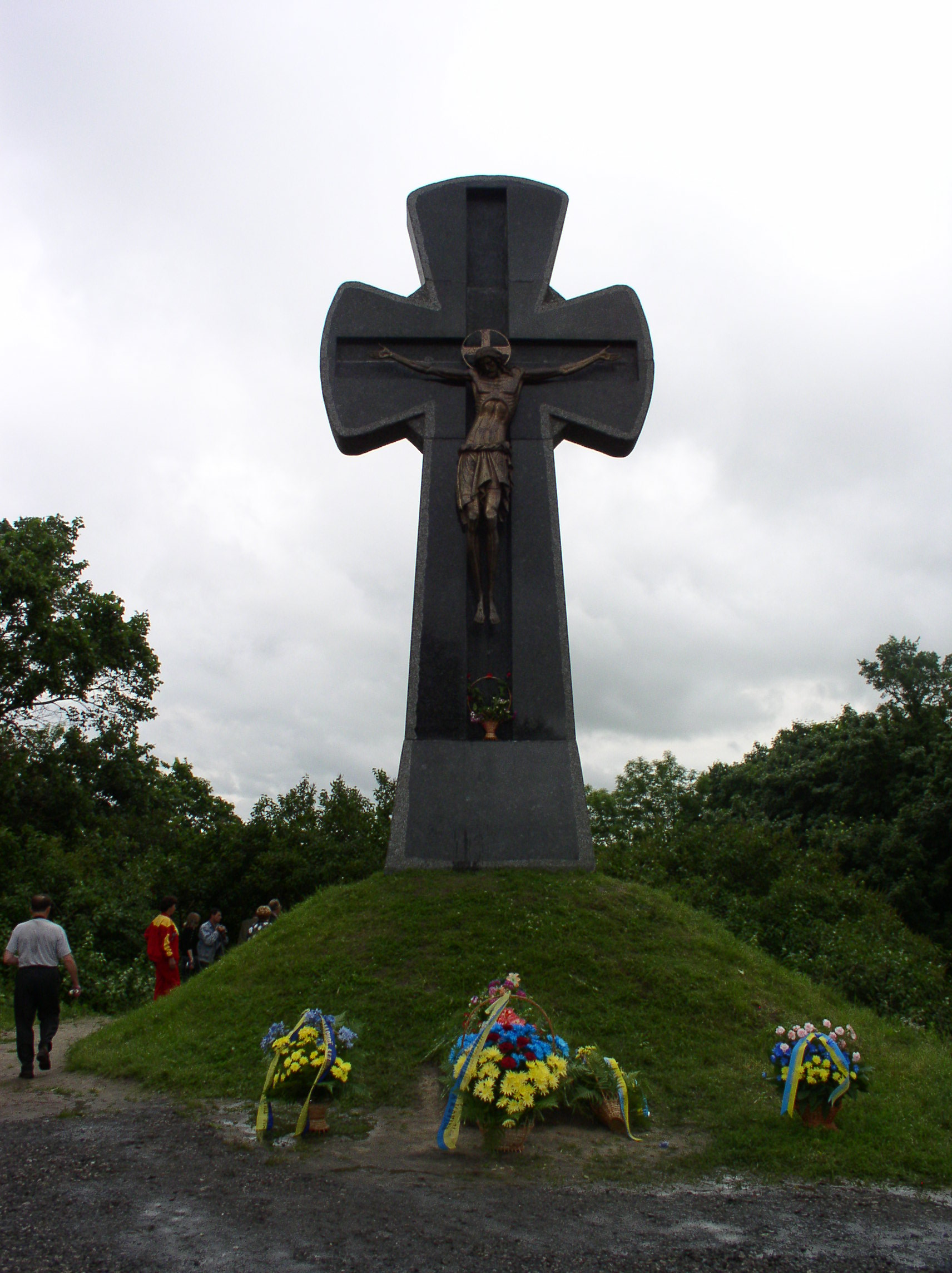 Памятный знак батуринцам, "вырезанным" войсками царя Петра І, Батурин, 2005 год